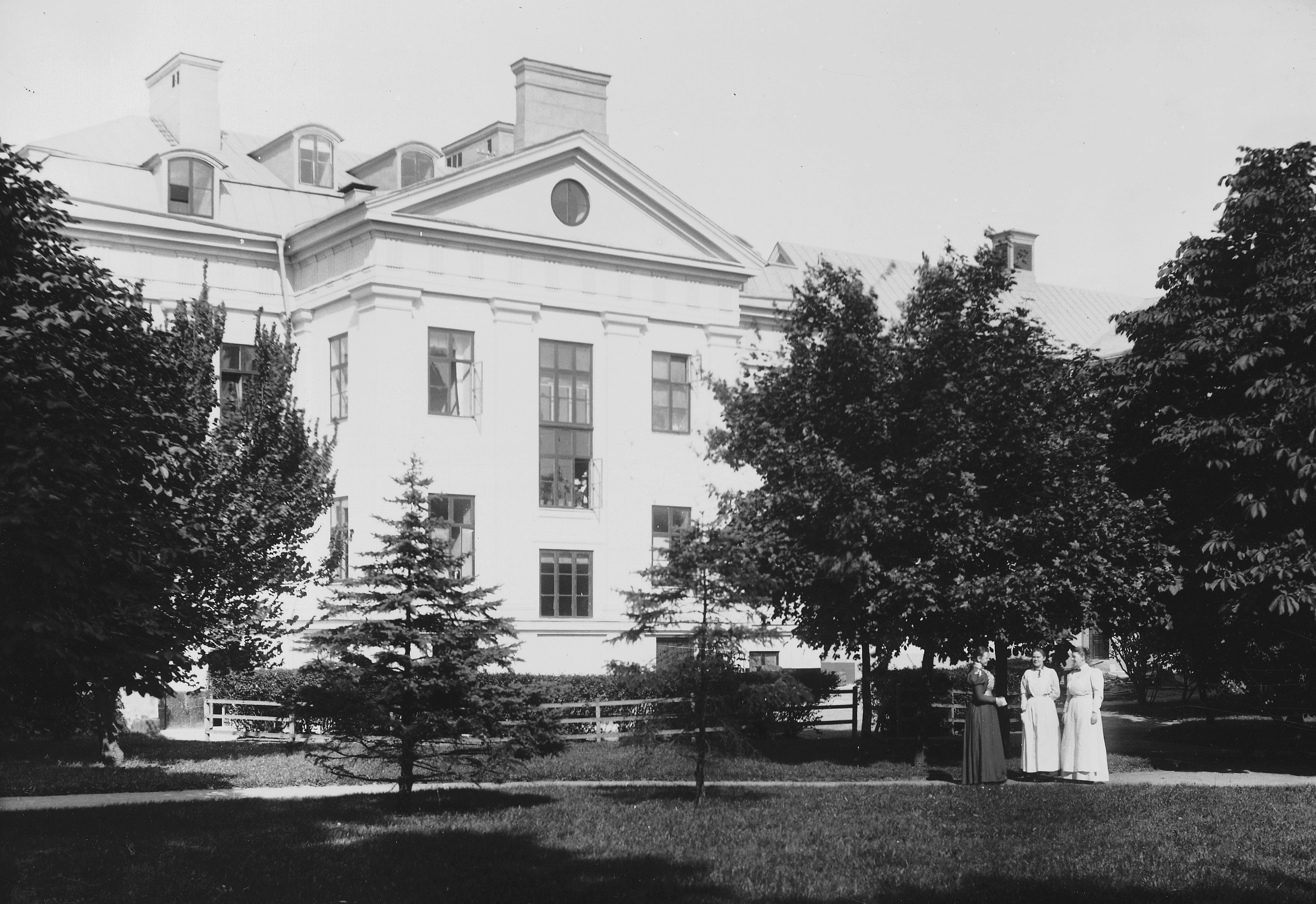 När Reenstiernas malmgård var Södra BB